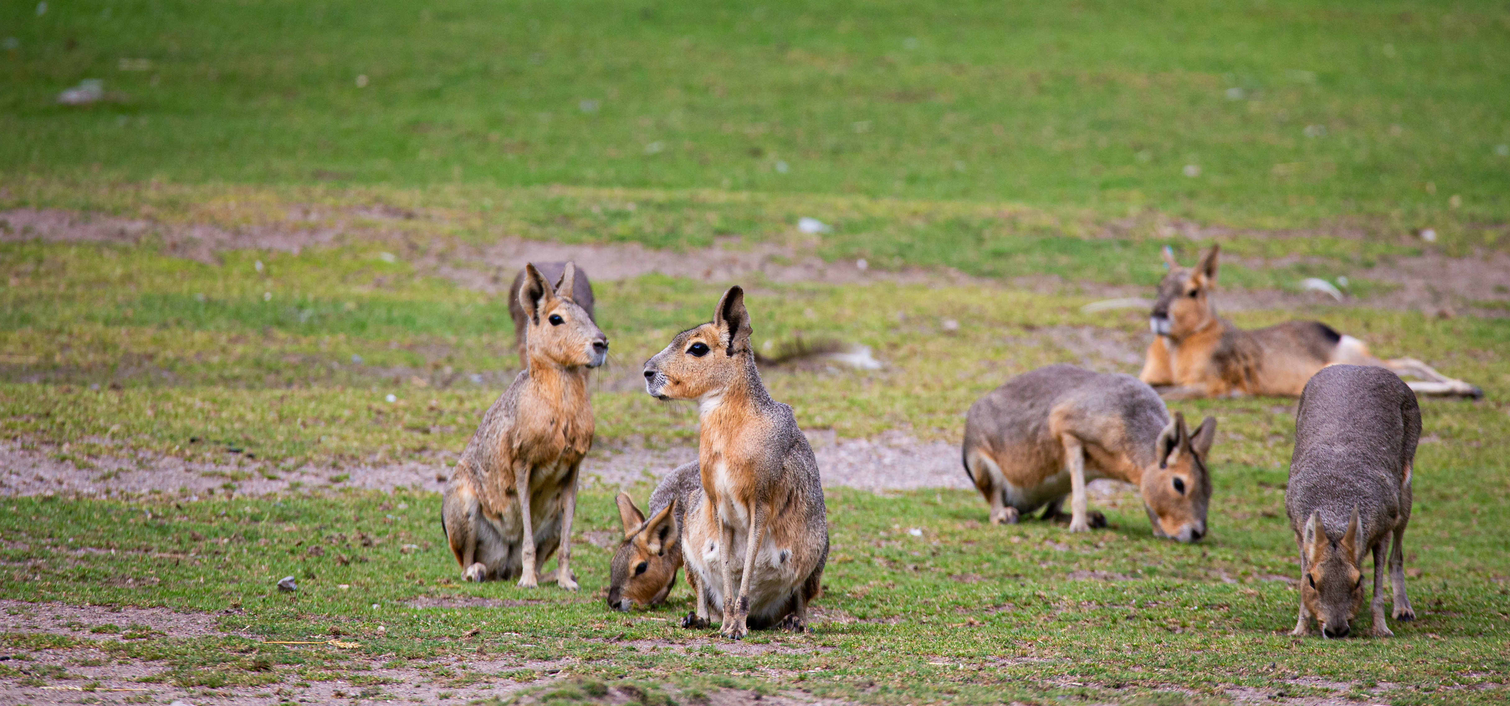 Vanliga maror, dolichotis patagonum, på Kolmårdens djurpark.